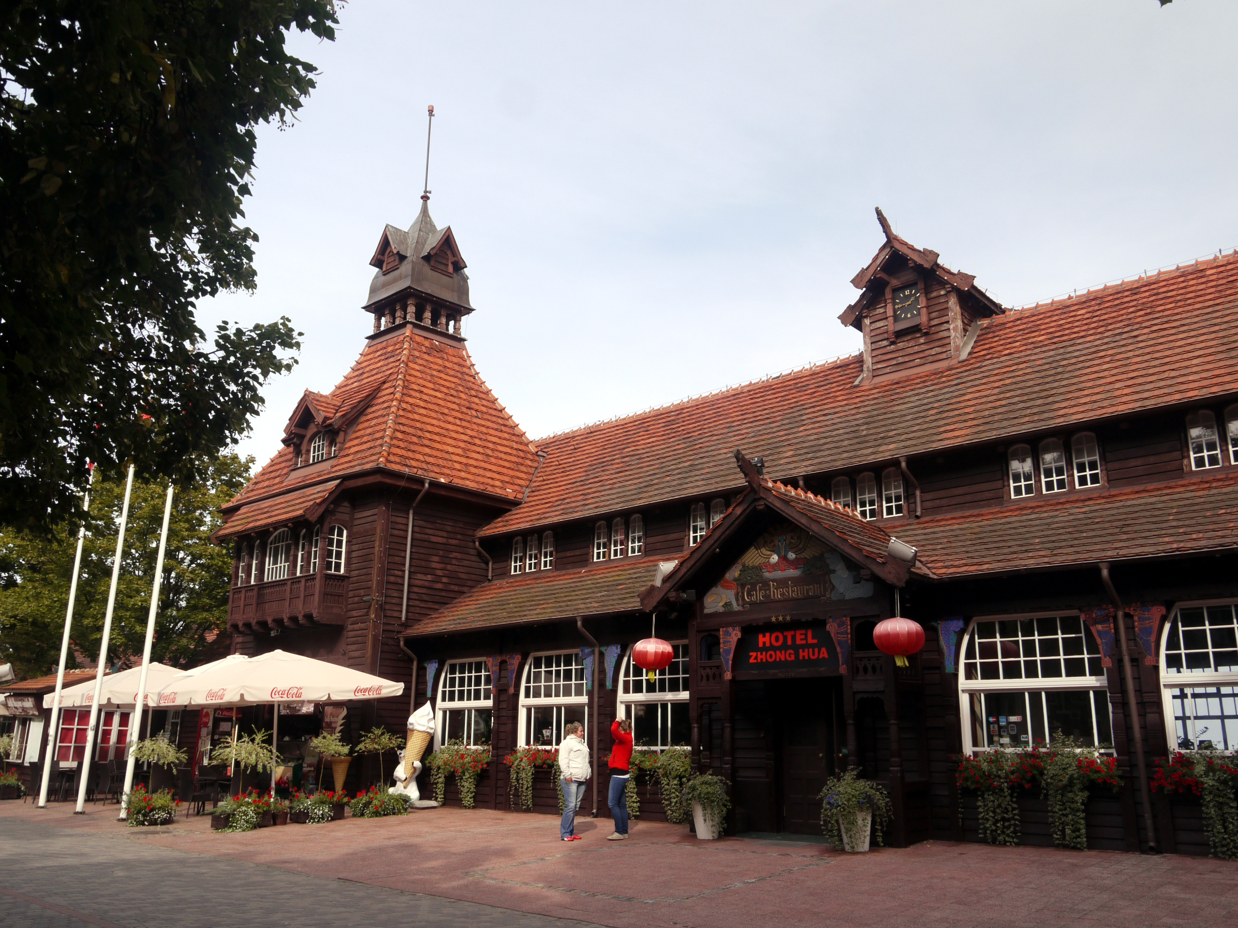 Łazienki Południowe (budynek główny, pawilon północny, pawilon południowy) al. Aleja Wojska Polskiego 1, Sopot